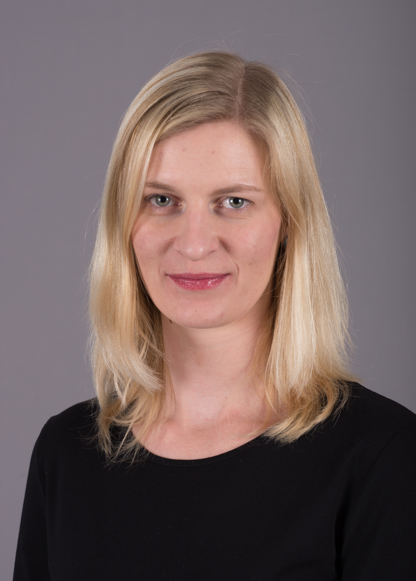 Landtagsprojekt im Thüringer Landtag